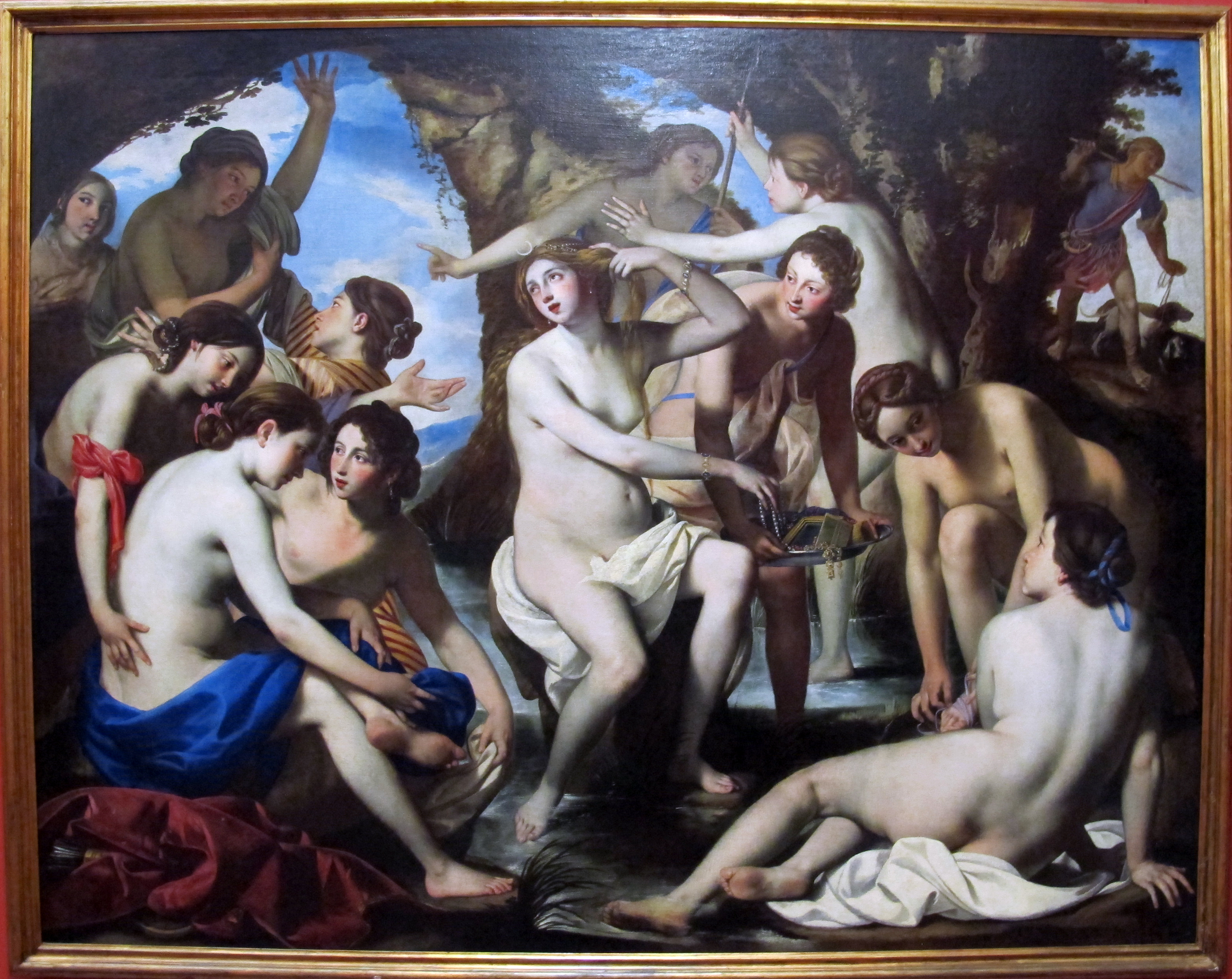 Galleria Napoletana (Museo di Capodimonte)